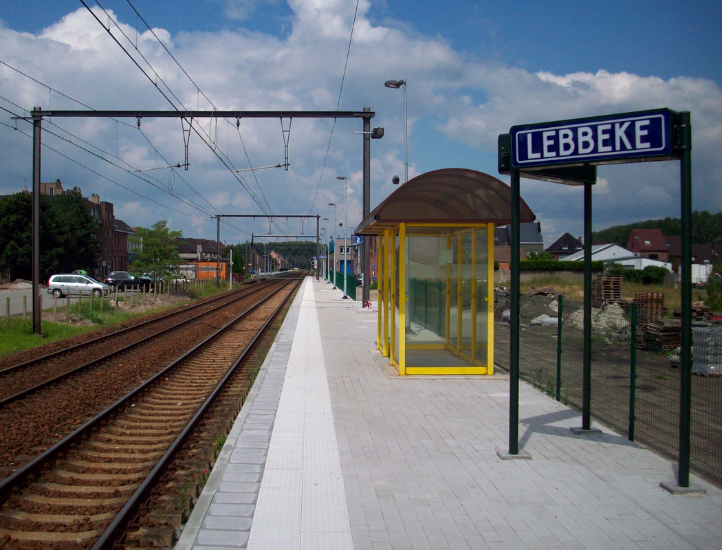 Station Lebbeke